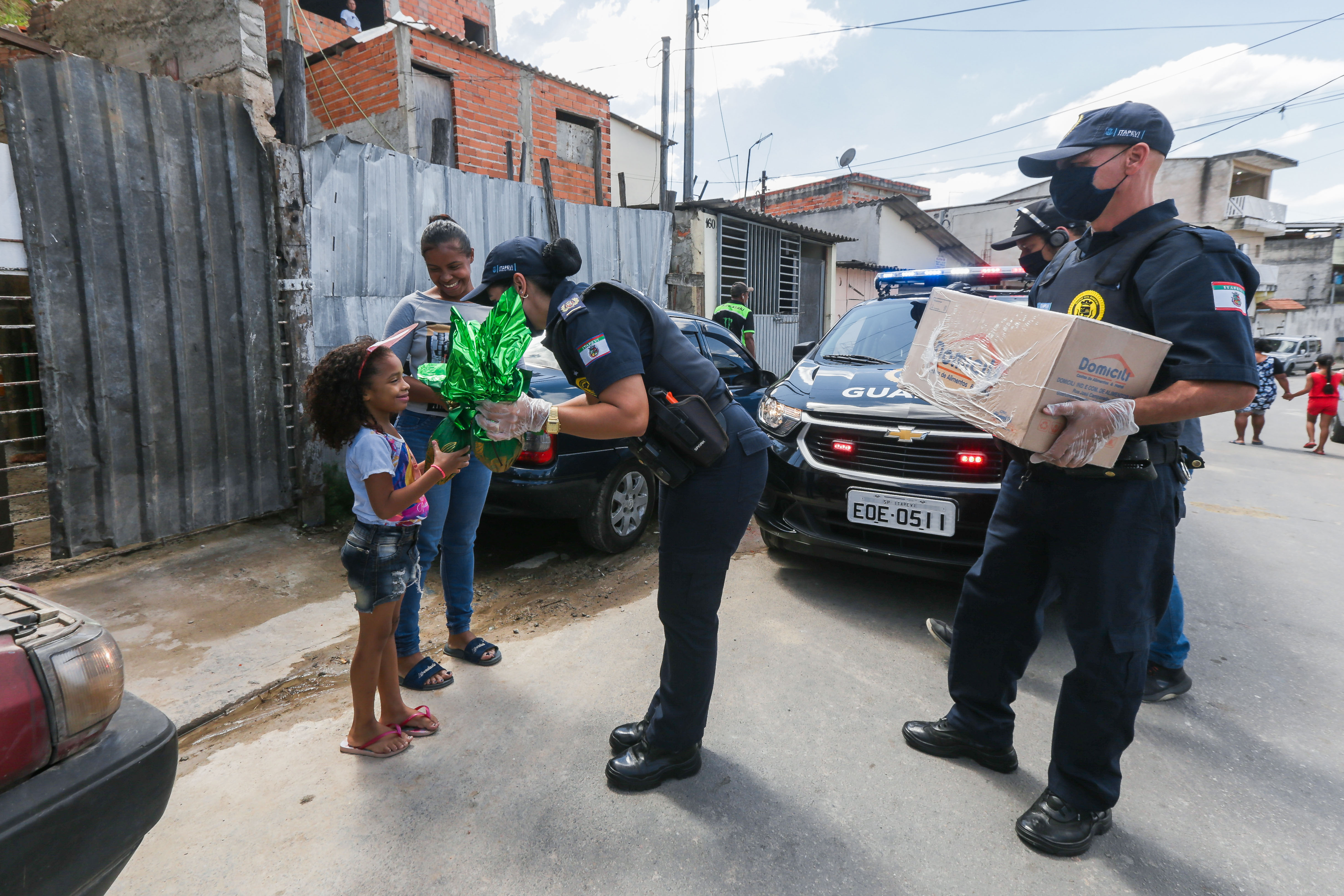 Foto: Pedro Godoy/ExLibris/PMI